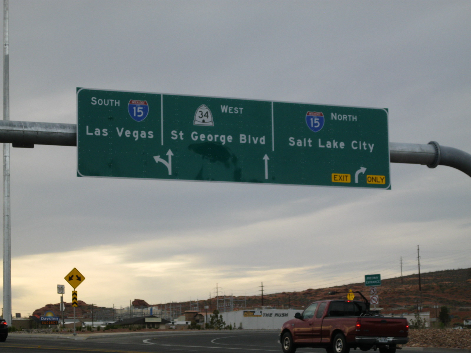 St. George DDI 2